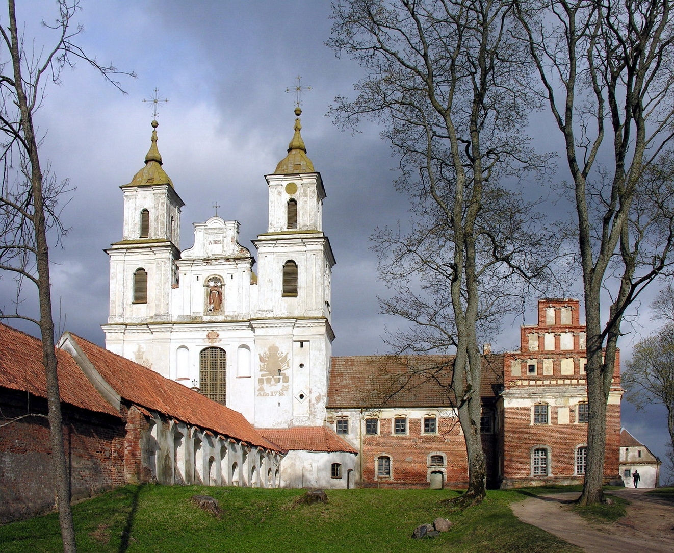 Tytuvėnų Švč. Mergelės Marijos bažnyčia 2007 m. balandžio 21 d., Lietuva